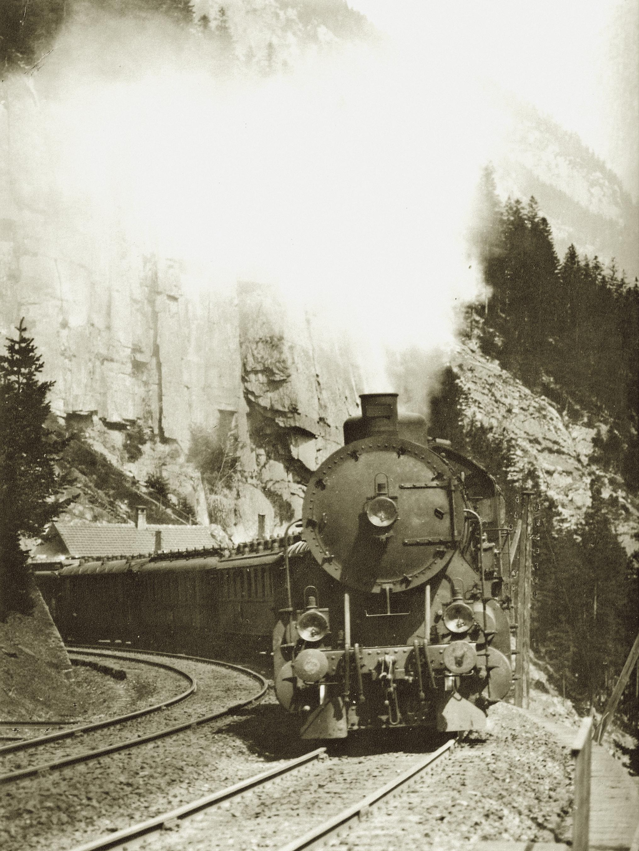 Bergwärts fahrender Expresszug der Gotthardbahn (GB) mit schwerer Vorspann-Lokomotive C 4/5, gebaut 1906 in der Lokomotivfabrik J. A. Maffei in München, auf der Gotthard-Nordrampe. Die Gotthard-Schnellzüge wurden zur Zeit der Aufnahme in der Regel von A 3/5 gezogen und auf der Bergstrecke durch C 4/5 verstärkt.